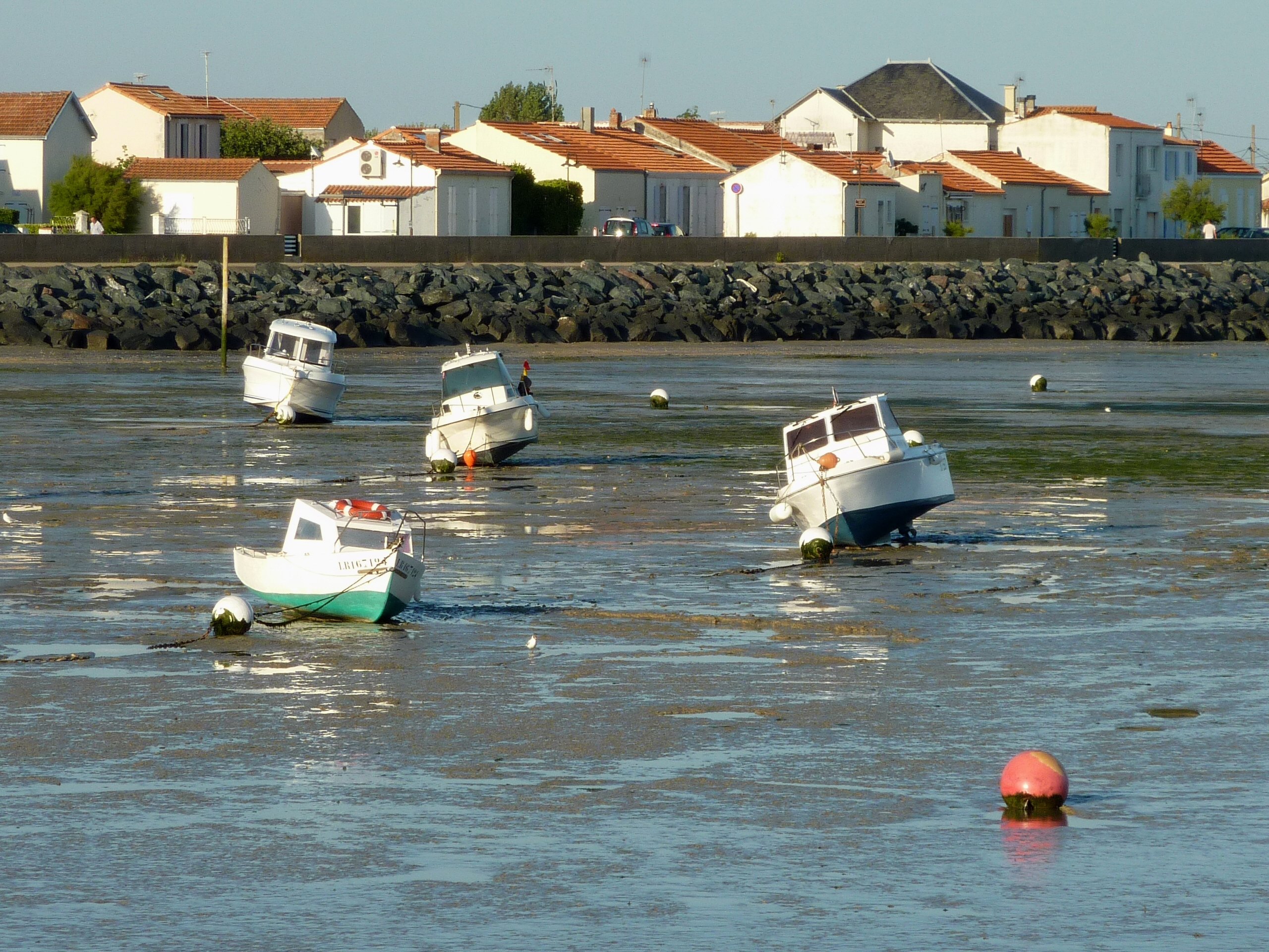 Les Bouchôleurs Châtelaillon-Plage Charente-Maritime France